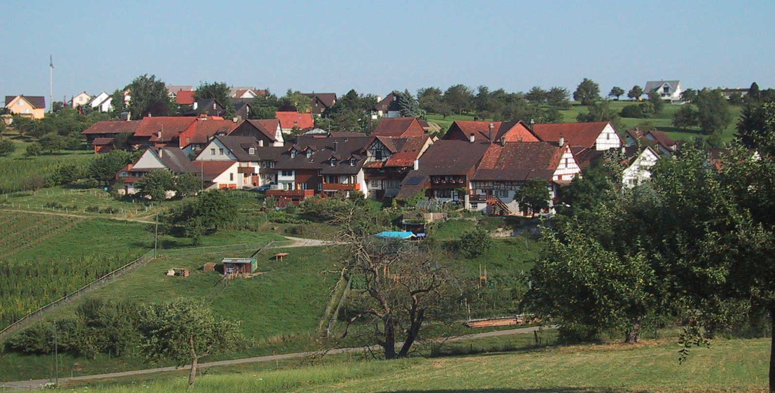 Buchberg Kanton Schaffhausen, Schweiz.